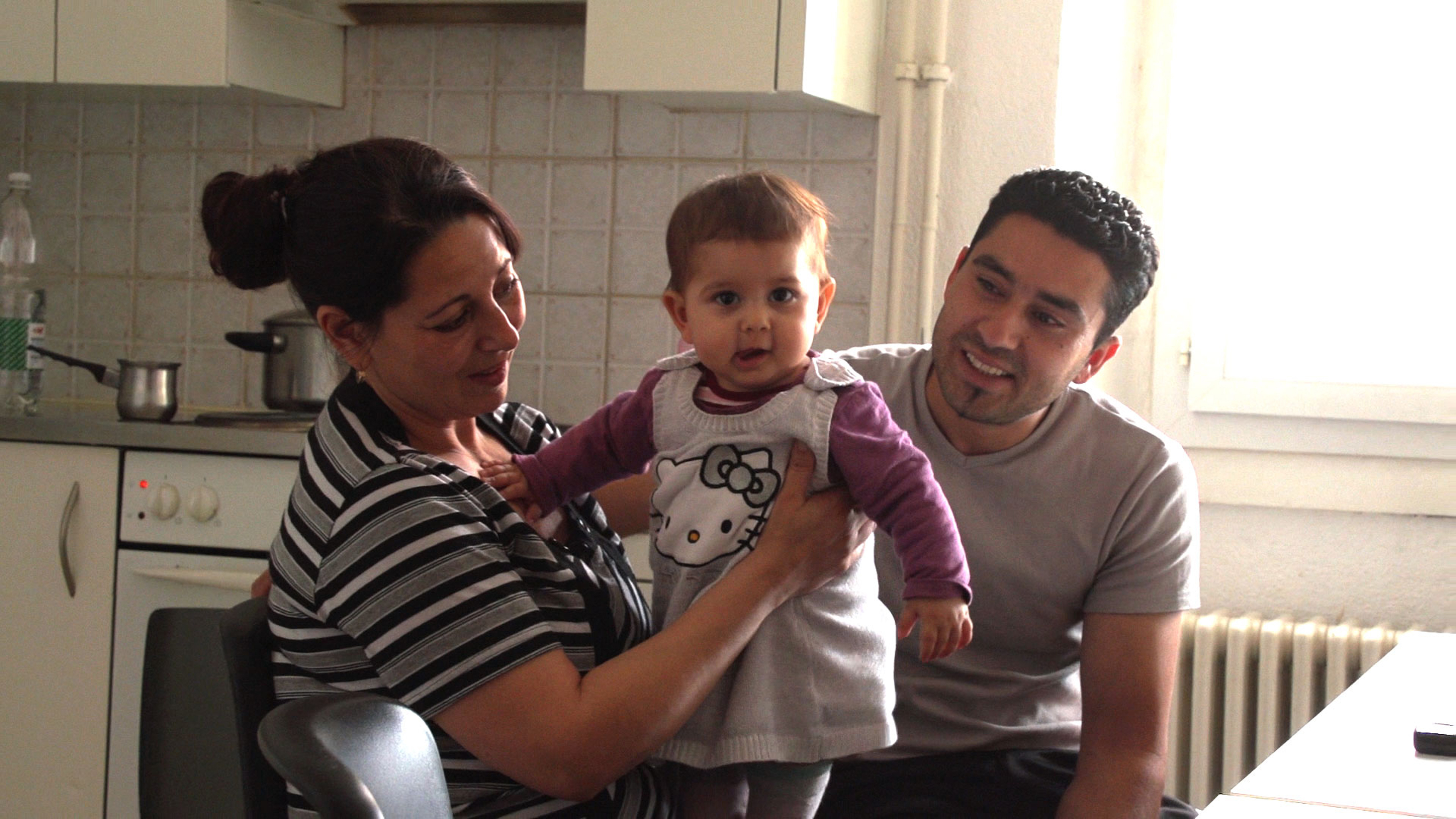 Jeton avec sa femme et leur enfant. Image tirée du film « Le monde est comme ça » de Fernand Melgar.